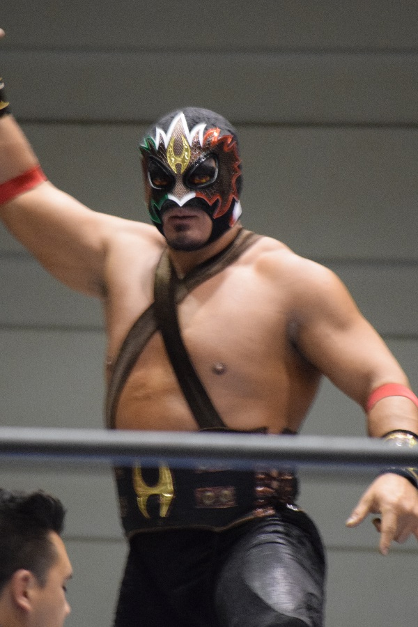 2017年1月13日 大阪府立体育会館・第二競技場「CMLL FANTASTICA MANIA 2017」 エチセロ